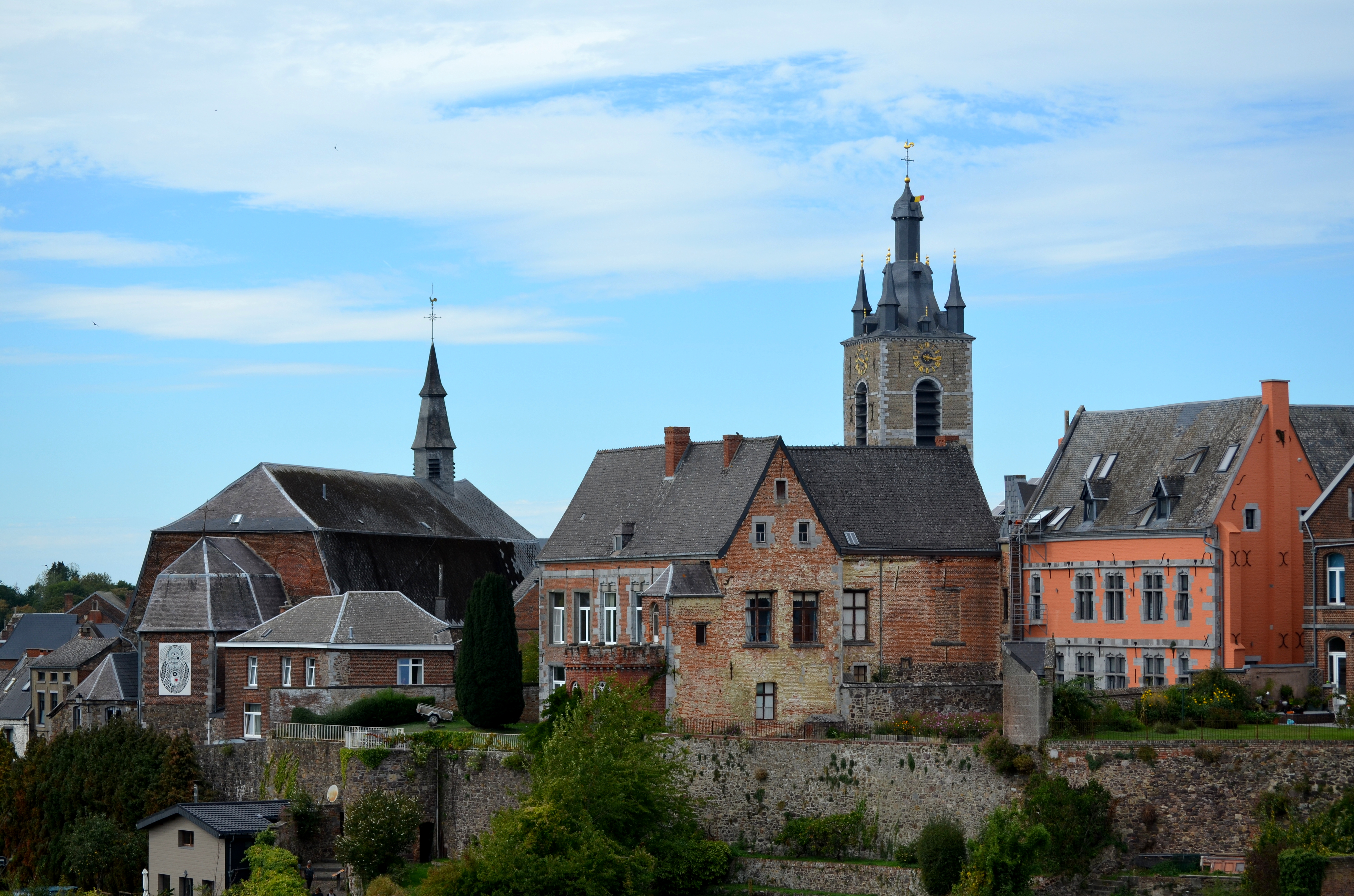 Thuin (Belgique) - Les jardins suspendus (dans le bas), et, de gauche à droite, l'église Notre-Dame-des-Carmes, l'ancien hôtel de la famille Bury, le beffroi et l'ancien refuge de l'abbaye de Lobbes. This photo of immovable heritage has been taken in the Walloon Region